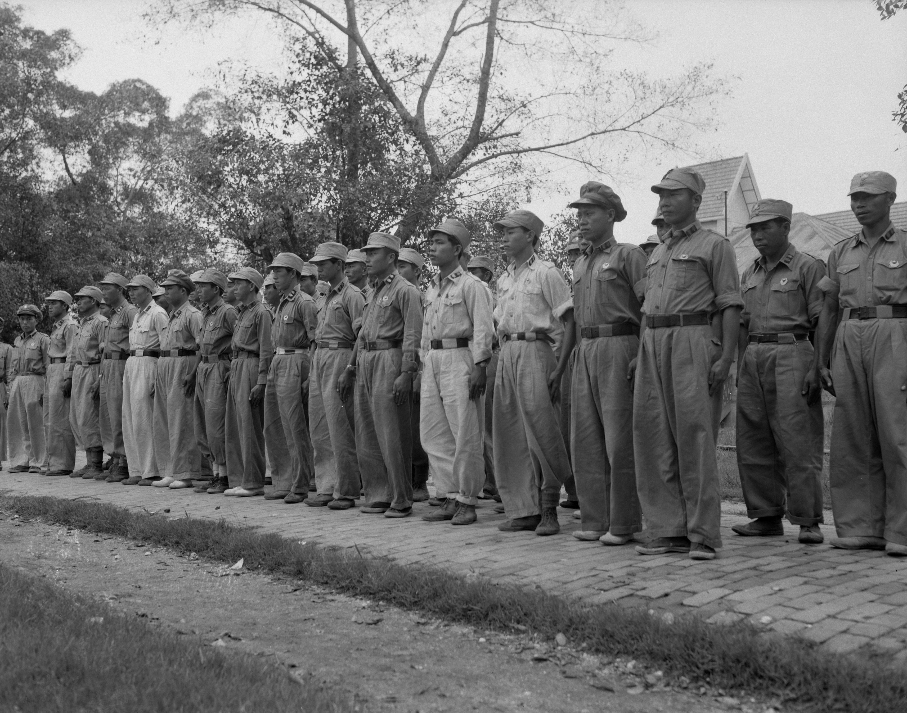 Collectie / Archief : Fotocollectie Dienst voor Legercontacten Indonesië Reportage / Serie : [DLC] Bagansiapiapi [2e Politionele Actie] Beschrijving : Bevrijding van Bagan Siapi-api (Sumatra). De Chinese "Politie Keamanan" te Bagan Siapi-api, die een grote rol speelde bij de handhaving van rust en orde Datum : 21 december 1948 Locatie : Indonesië, Nederlands-Indië Fotograaf : Bennekom, Ad van / DLC Auteursrechthebbende : Nationaal Archief Materiaalsoort : Negatief (zwart/wit) Nummer archiefinventaris : bekijk toegang 2.24.04.03 Bestanddeelnummer : 15074